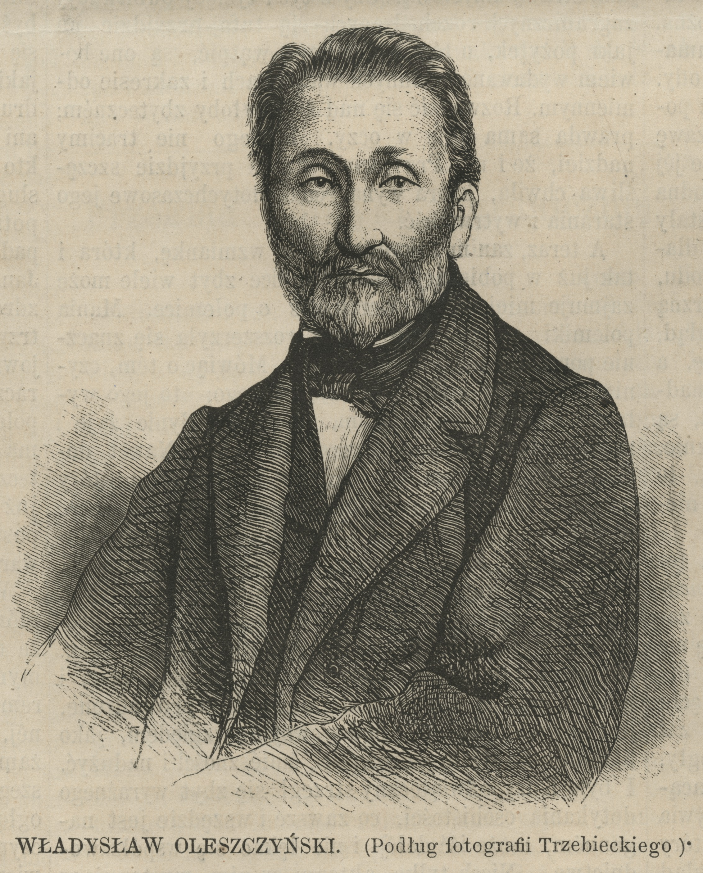 Władysław Oleszczyński : (Podług fotografii Trzebieckiego)